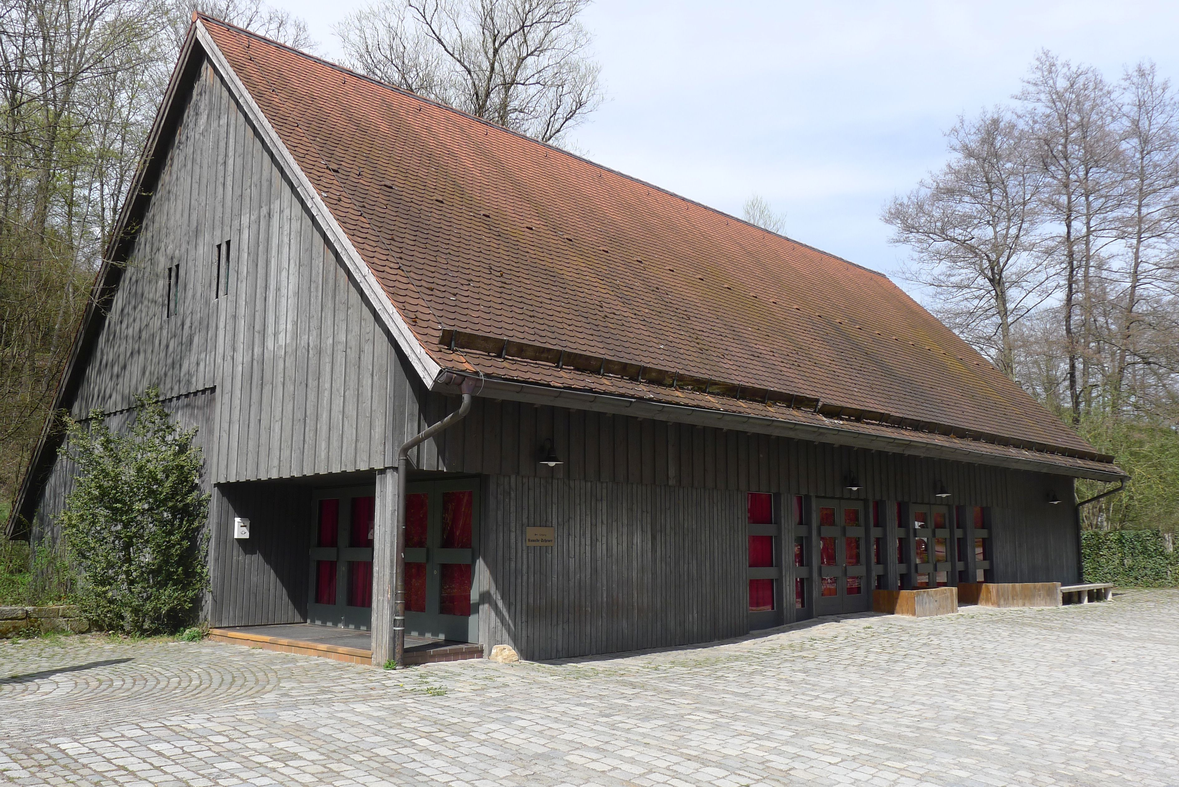 De Komede-Scheuer, ook aangeduid met Theaterscheune Mäulesmühle, de bakermat van Hannes und der Bürgermeister